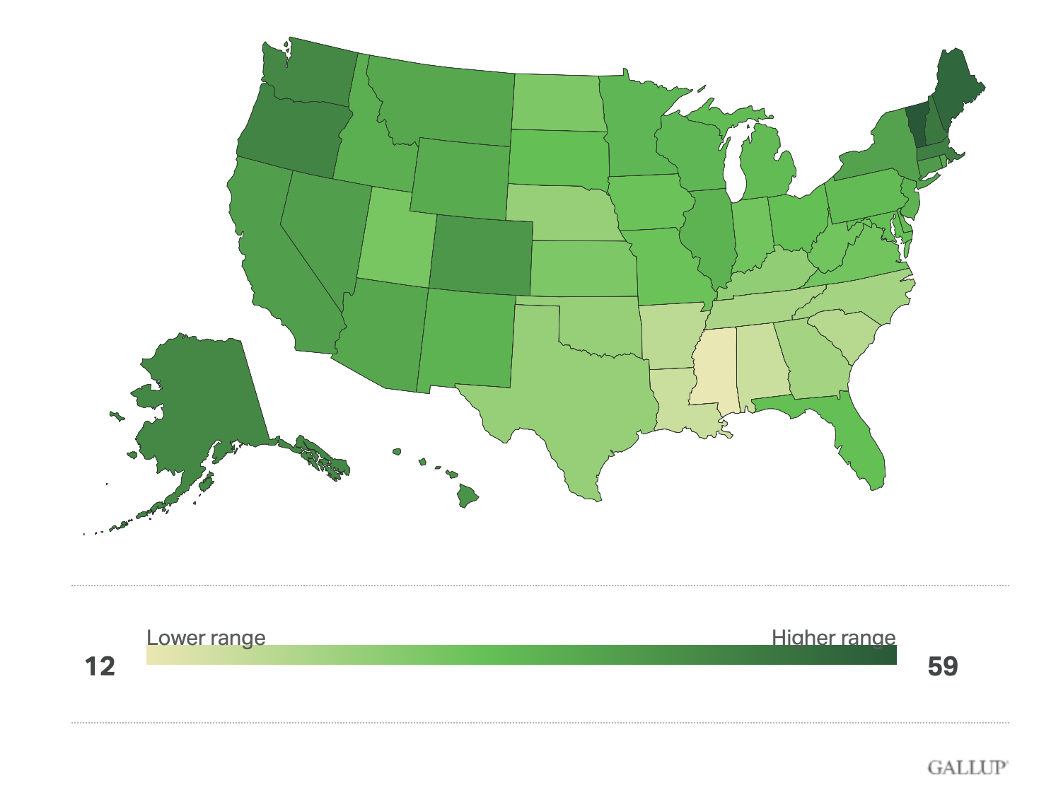 Карта ранжирования "нерелигиозных" штатов в США